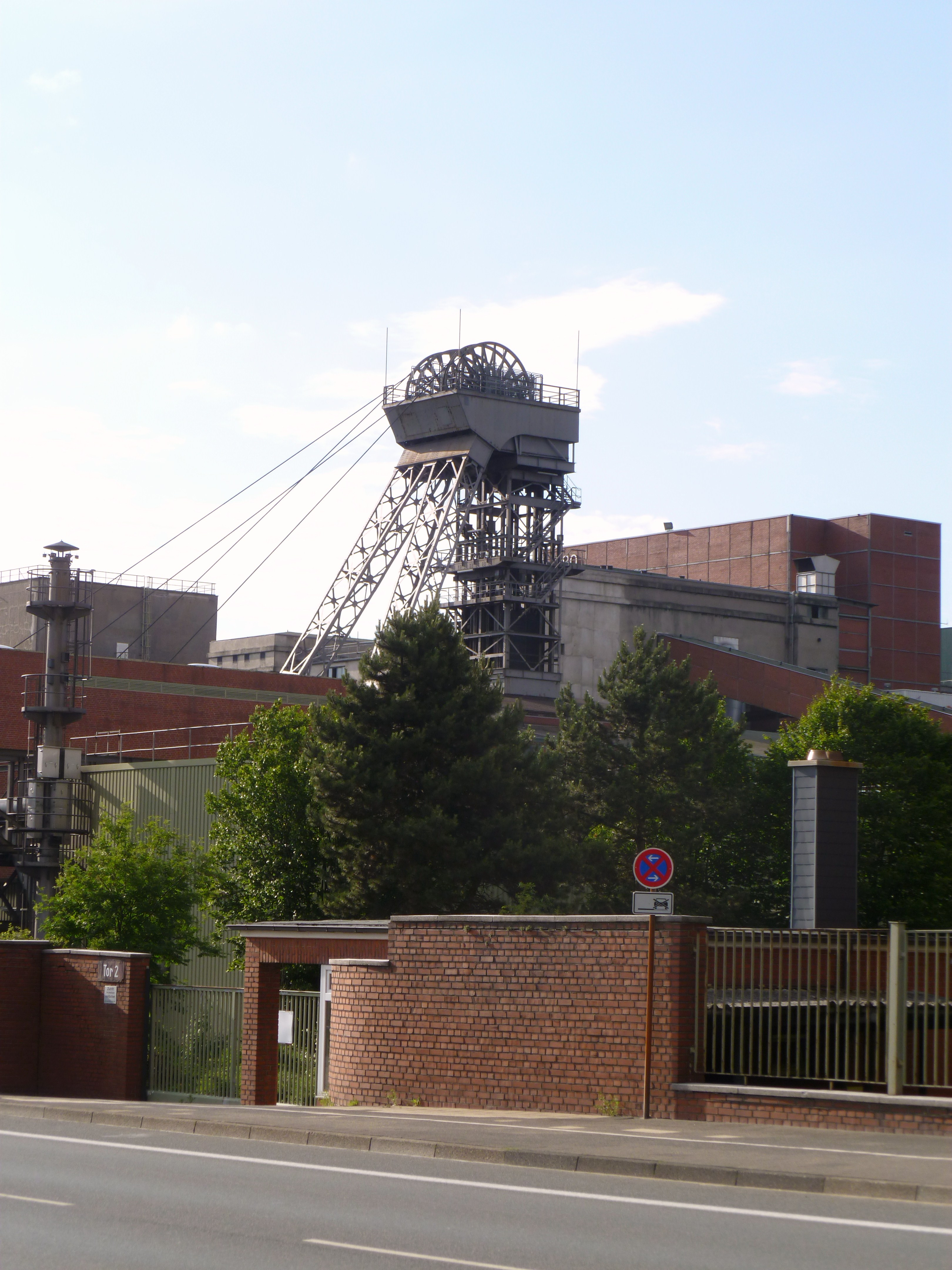 Förderturm des von Oeyenhausenschachtes 3